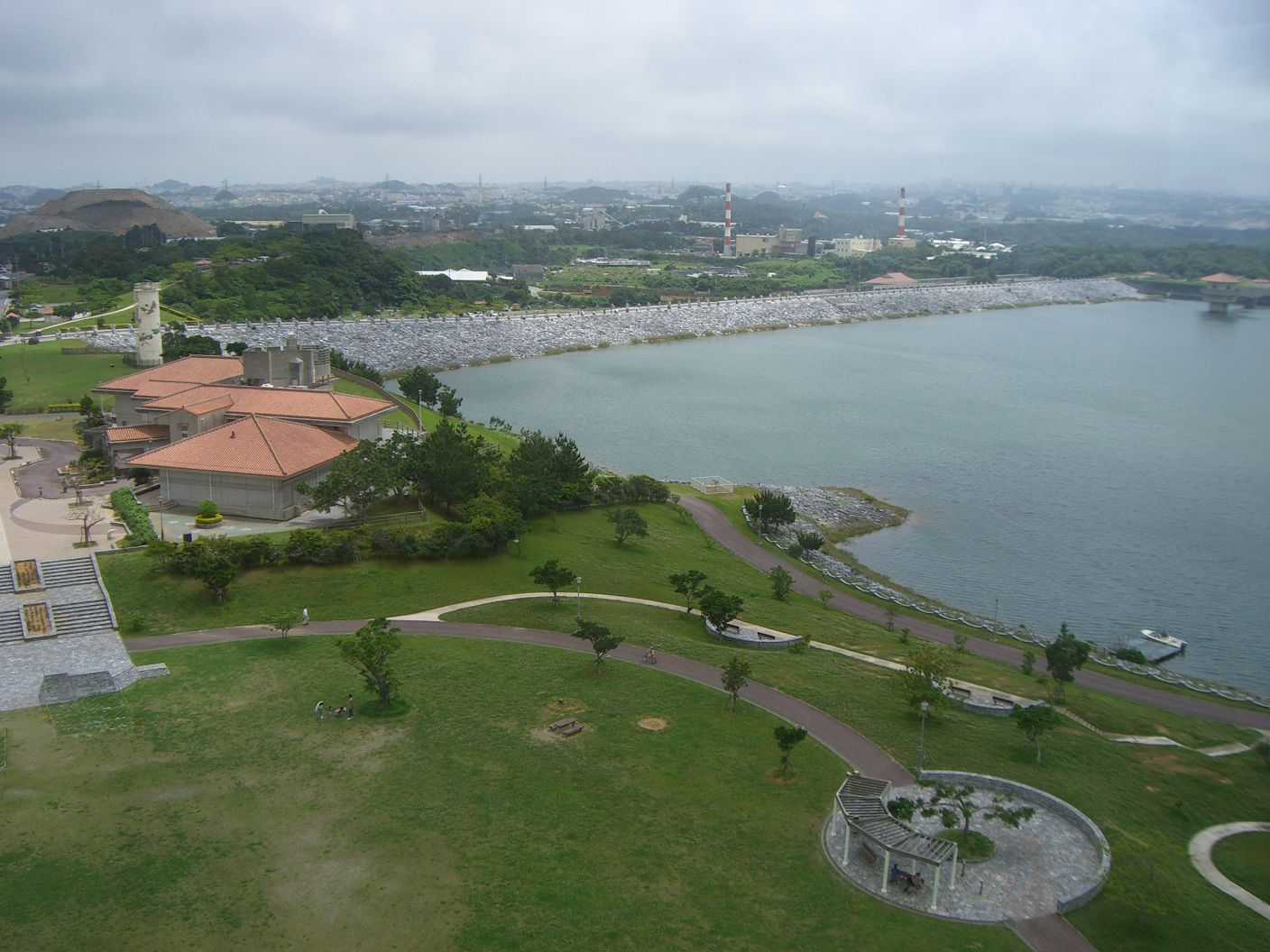 Kurashiki dam in Okinawa, Japan.(沖縄県の倉敷ダム)